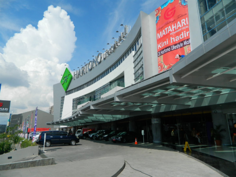 Hartono Lifestyle Mall